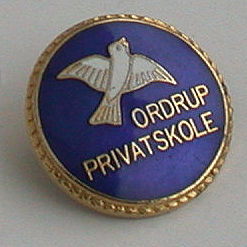 Ordrup Privatskole Emblem Nål.